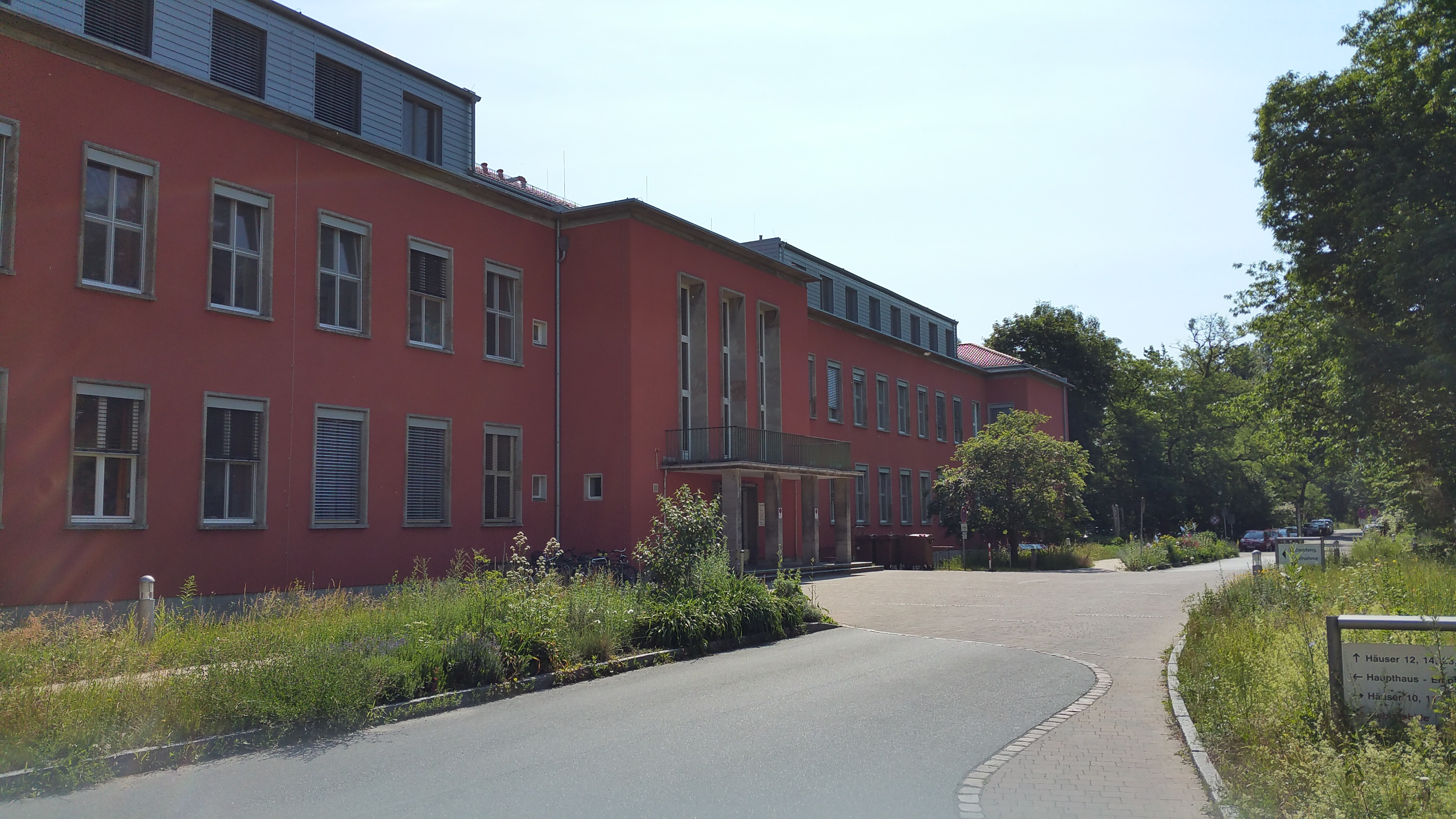 Hauptgebäude/Haus 13